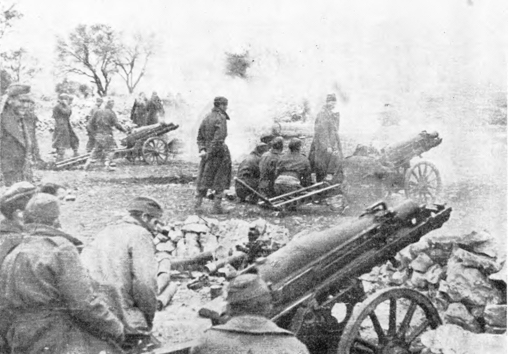 Baterije brdske artilerije v bojih pri Kninu v decembru 1944.